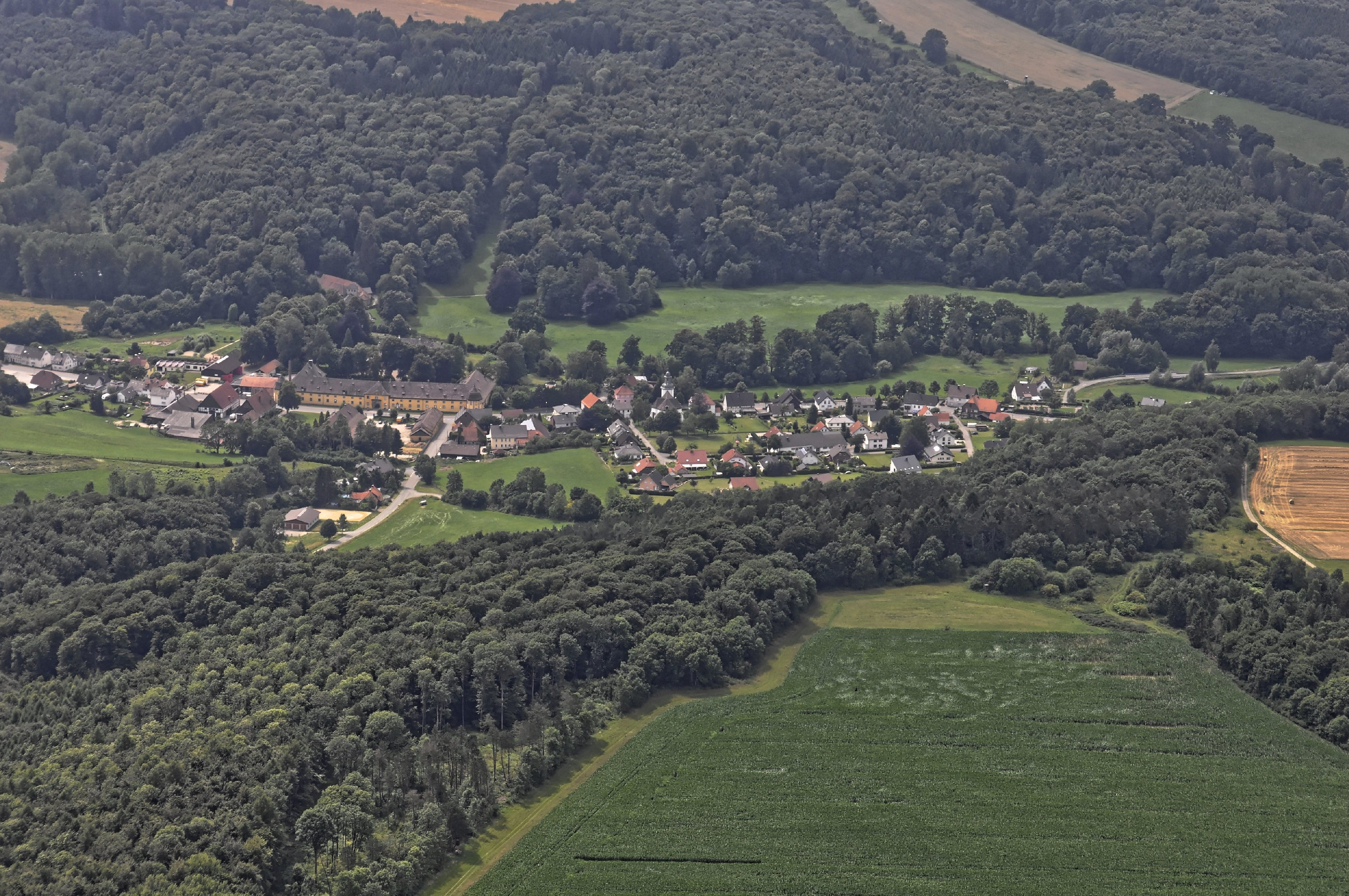 Bilder vom Flug Nordholz-Hammelburg 2015: Brakel-Rheder